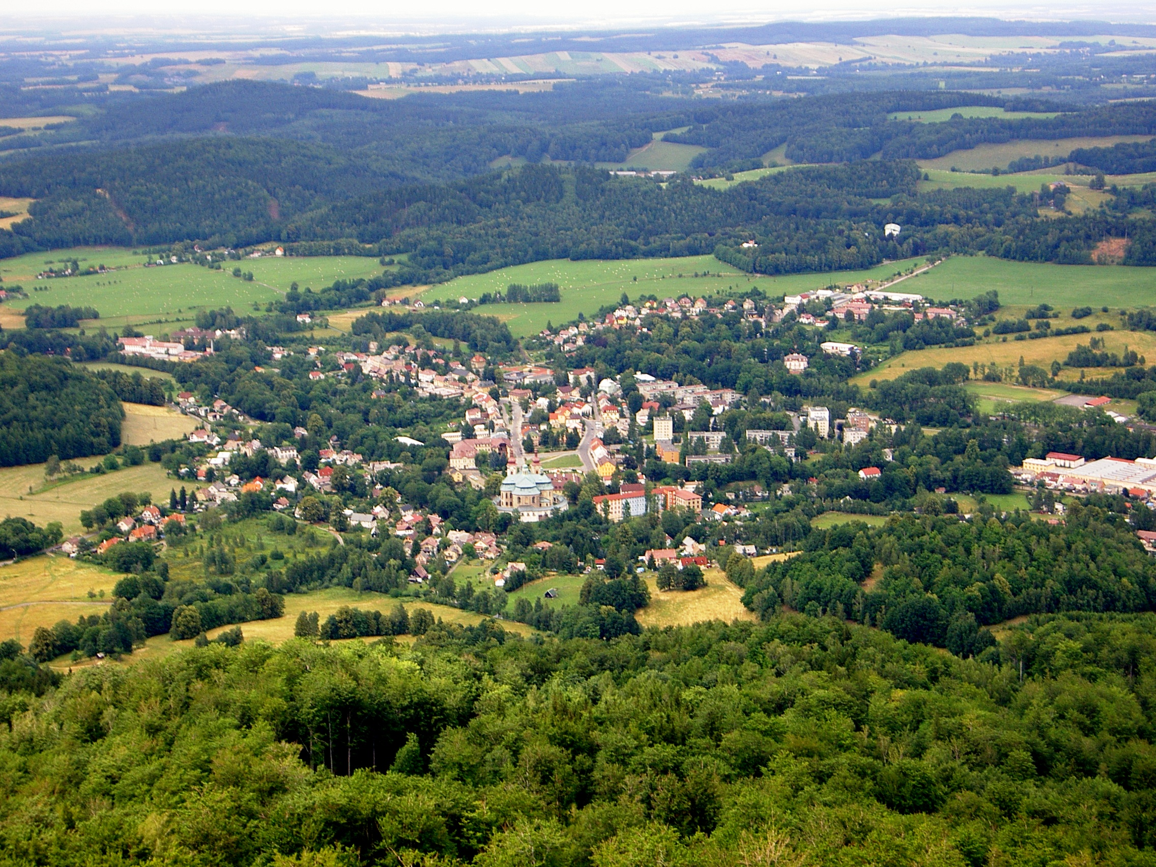 Hejnice, view from a top of Ořešník